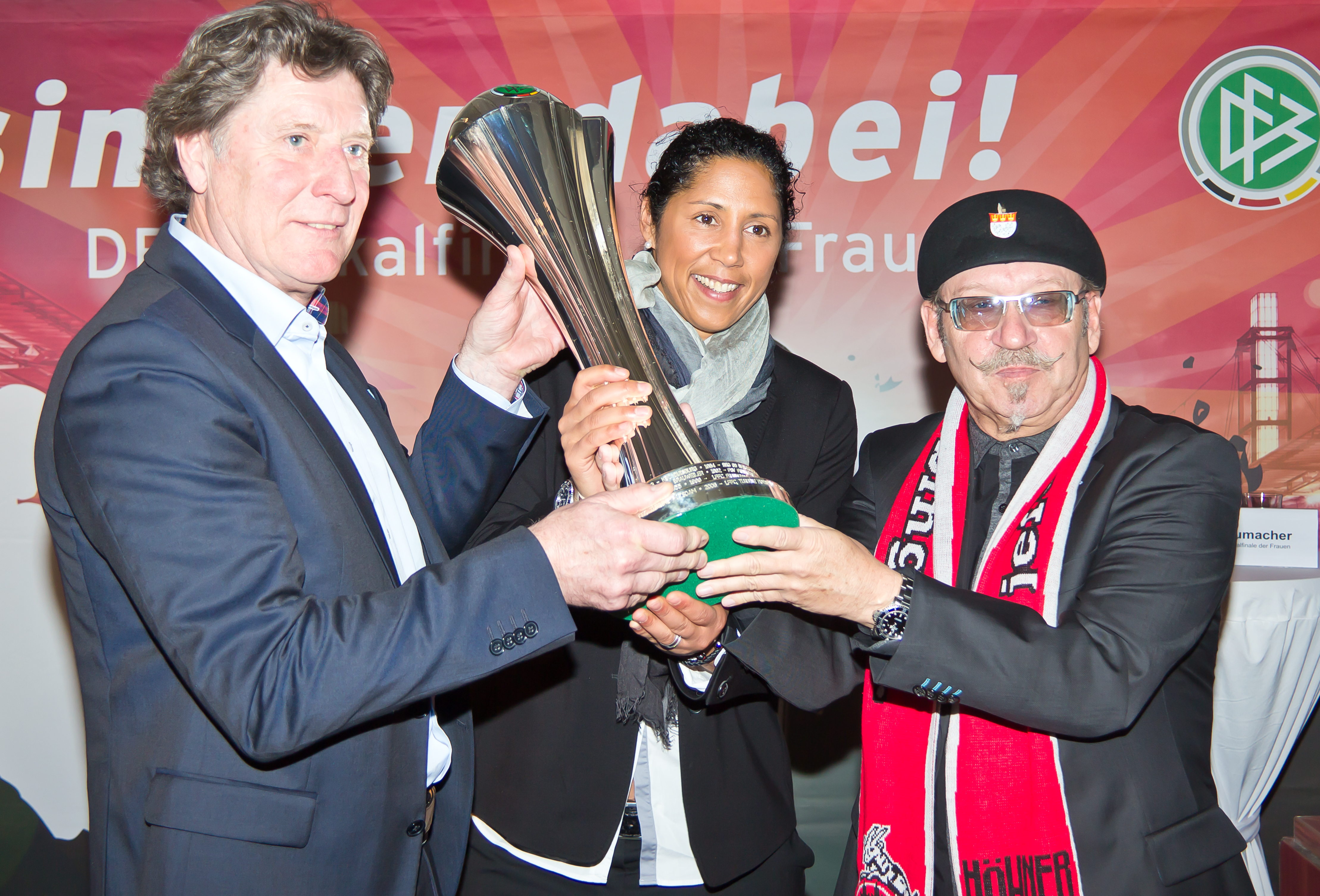 Pressetermin im Deutschen Sport & Olympia Museum Köln: Übergabe der Siegertrophäe für das DFB-Pokalfinale der Frauen (19. Mai 2013 im RheinEnergieStadion) durch DFB-Direktorin Steffi Jones an den Austragungsort Köln. Den Pokal nehmen FC-Vizepräsident Toni Schumacher und Höhner-Schlagzeuger Janus Fröhlich als Botschafter der Stadt Köln für das DFB-Pokalfinale der Frauen sowie Horst Meyer, stellvertretender Leiter des Sportamtes, entgegen. Den Pokal präsentieren: Toni Schumacher, FC-Vizepräsident und Botschafter der Stadt Köln für das DFB-Pokalfinale der Frauen Steffi Jones, DFB-Direktorin Janus Fröhlich, Schlagzeuger der Höhner und Botschafter der Stadt Köln für das DFB-Pokalfinale der Frauen